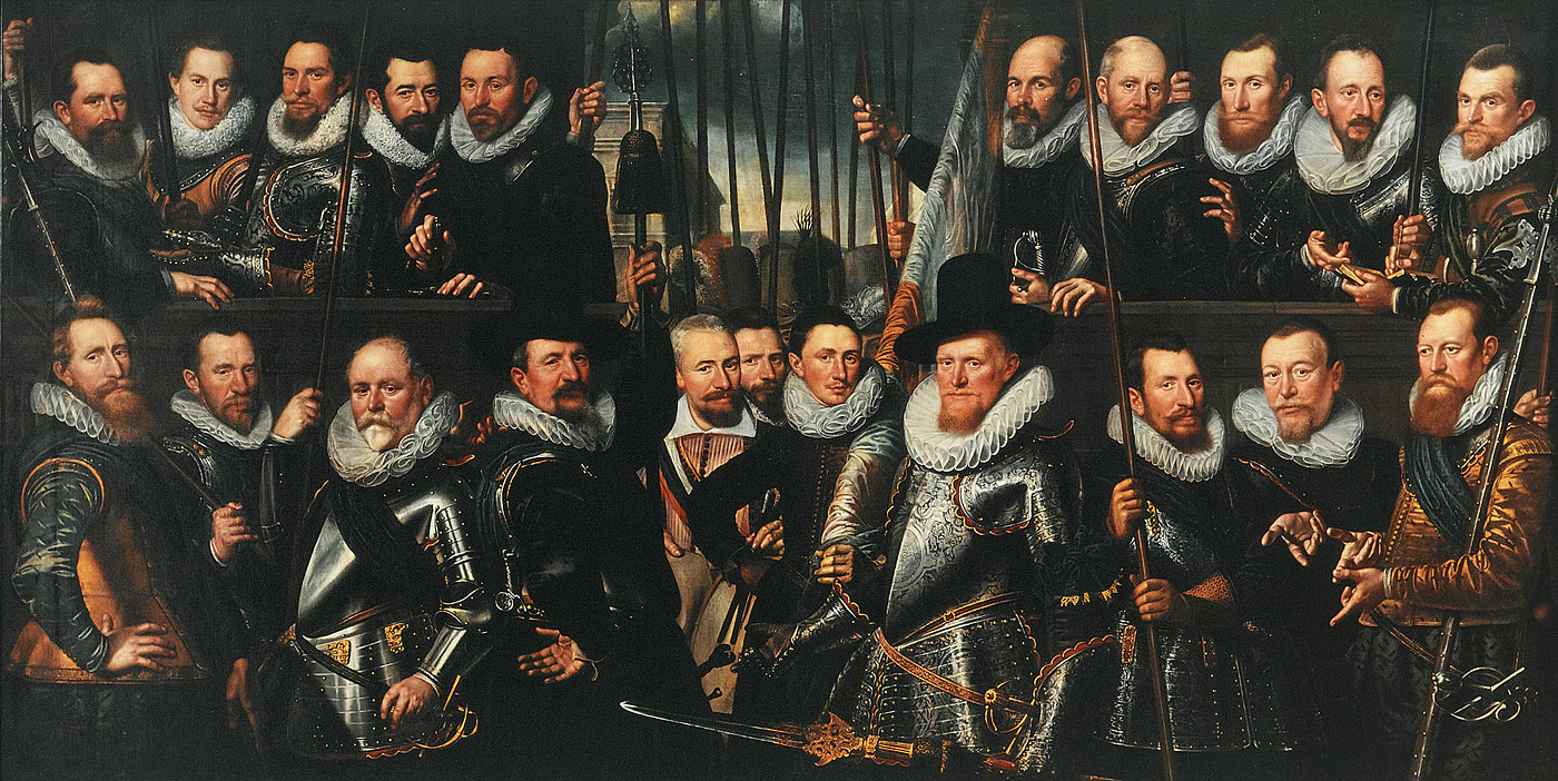 schilderij; Voetboogdoelen; portret; portret Amsterdam; groepsportret; schuttersstuk; Cloeck, Nanning Florisz; Grootenhuys, Arent ten; Grootenhuys, Jan ten; Cloeck, Jacob Florisz.